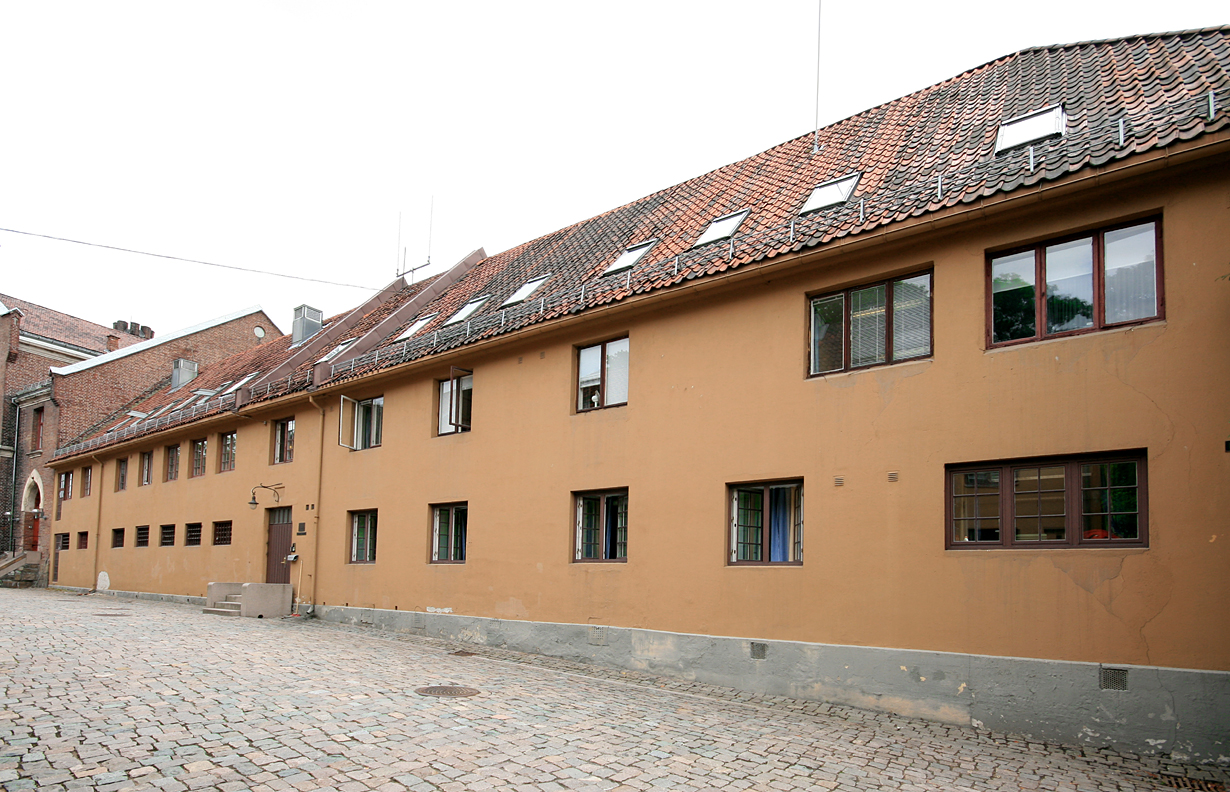 Kornmagasinet, Akershus festning, Oslo. Ombygd til slaveri 1820.